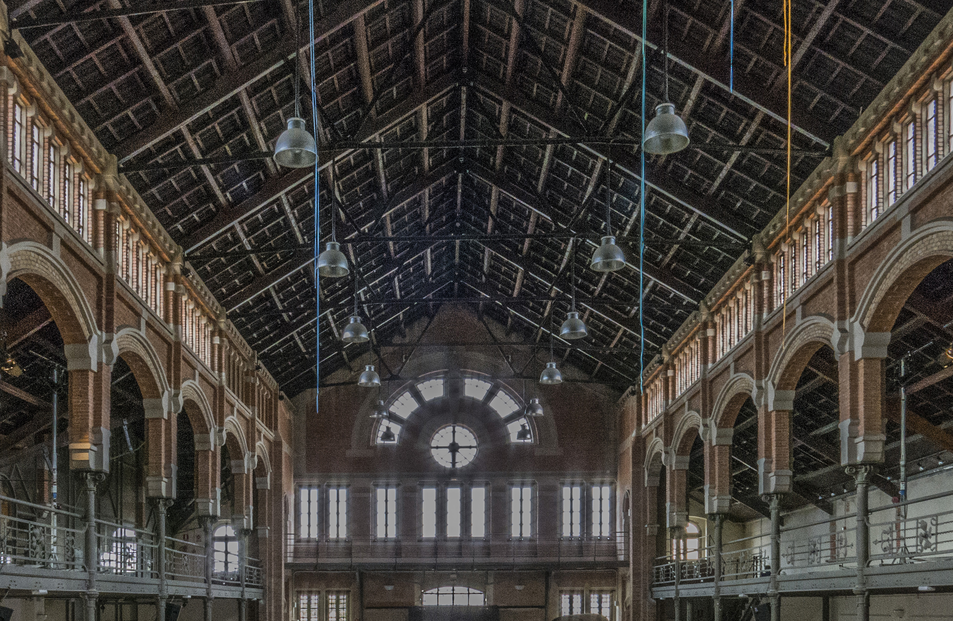 La Fira Modernista es va organitzar per l'Ajuntament de Carcaixent el cap de setmana del 10 al 12 de juny de l'any 2016.